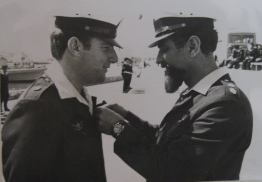 סא"ל שאול סלע מעביר את הפיקוד על יחידה 707 לרס"ן דב בר. אות התמנון בצד שמאל אות העטלף עובר לצד ימין, 1972.